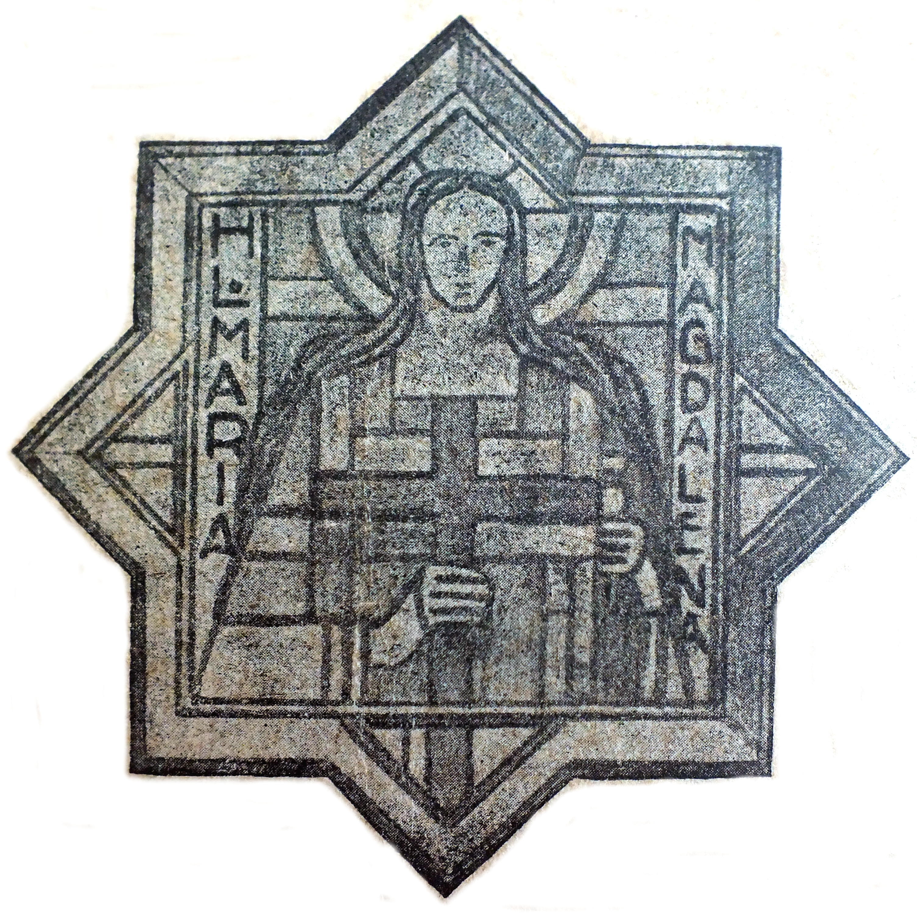 Kirche Maria Magdalena, Berlin-Niederschönhausen: ursprüngliches Fenster in Höhe der Orgelempore, Maria Magdalena darstellend